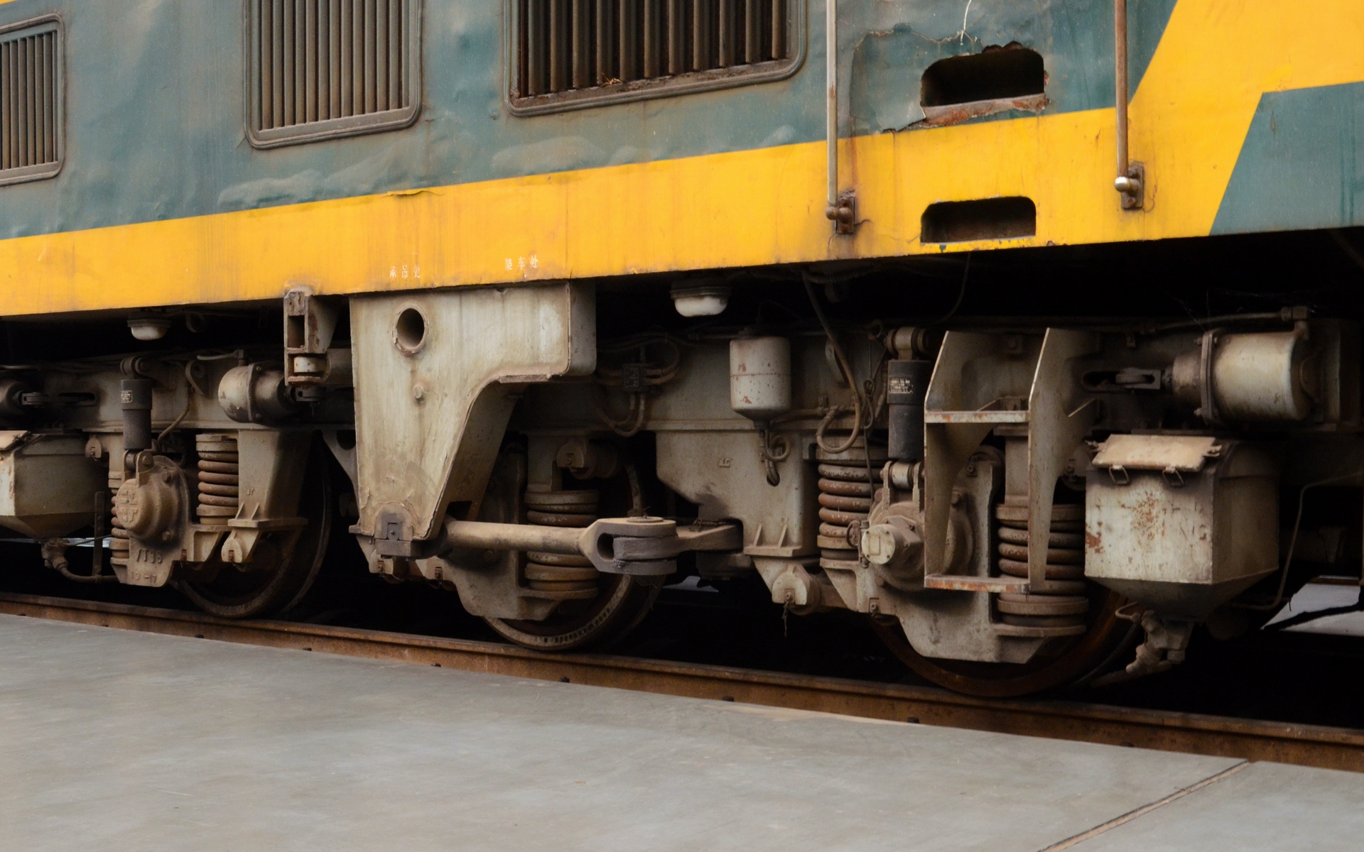 DF7D型0001号机车的转向架